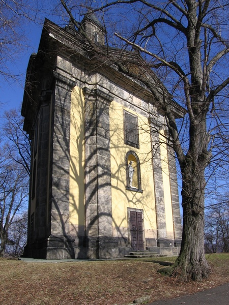 Česky: Kaple na Horce v Chlumci